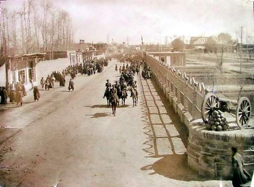 خیابان میرداماد تهران - 1248